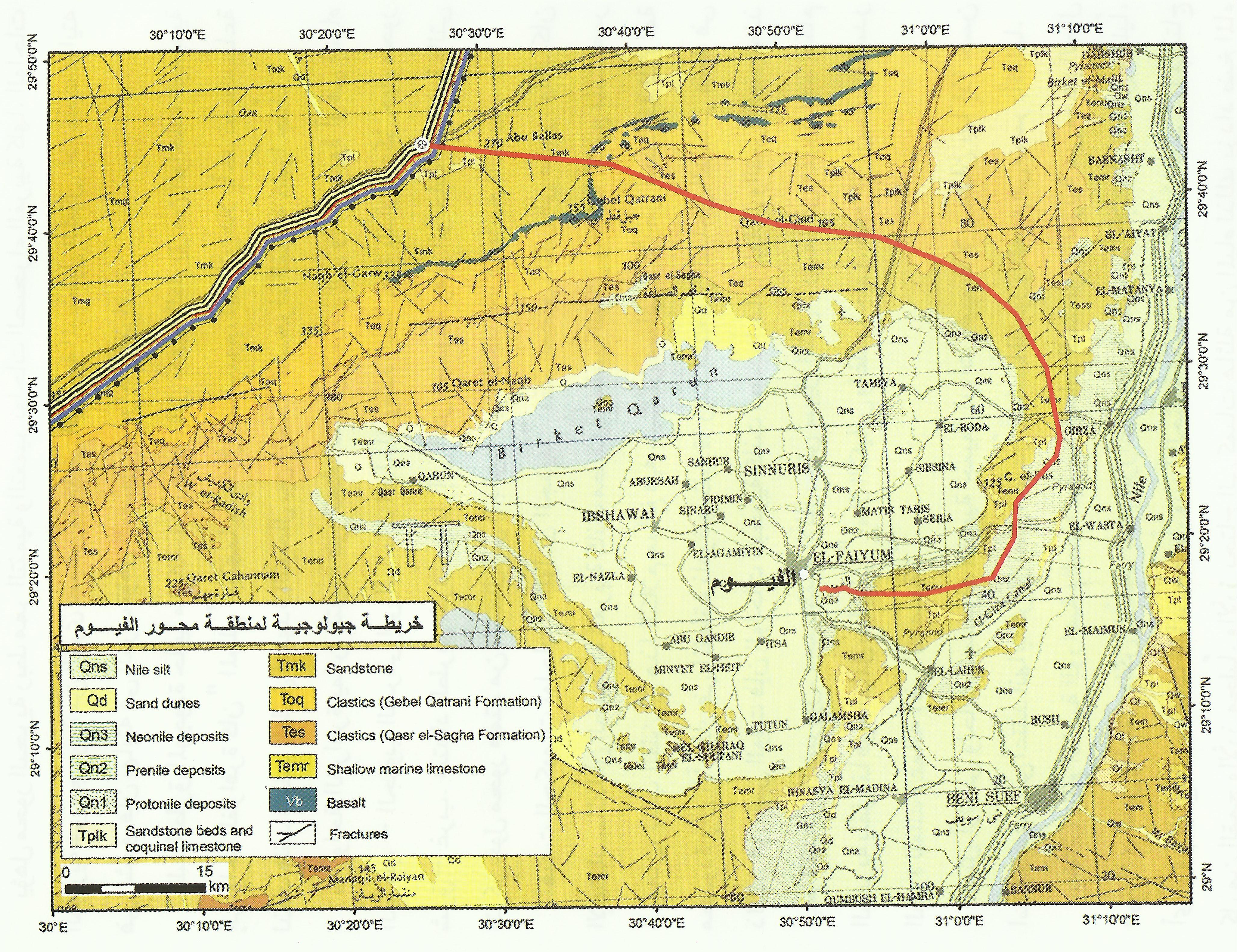 محور تعمير الفيوم